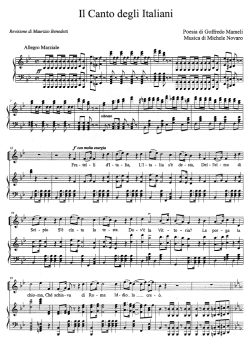 Fratelli d'Italia, 1. Teil